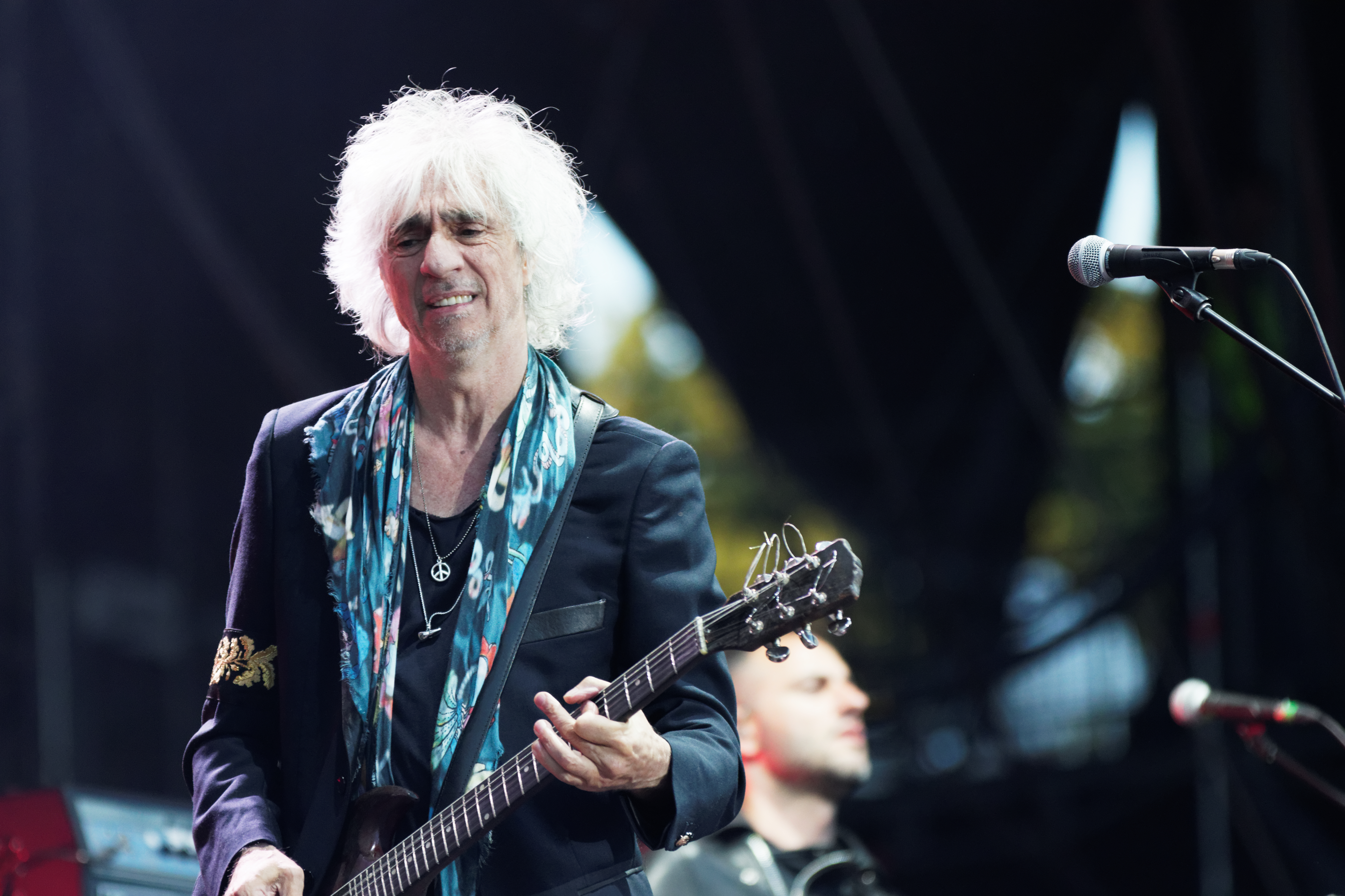 Les Insus en concert lors du festival des vieilles charrues 2016.